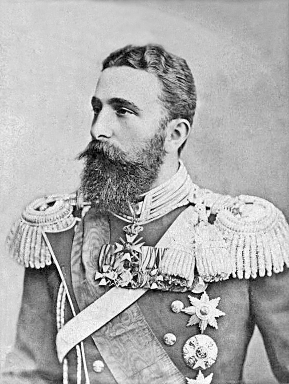 Княз Александър Батенберг.